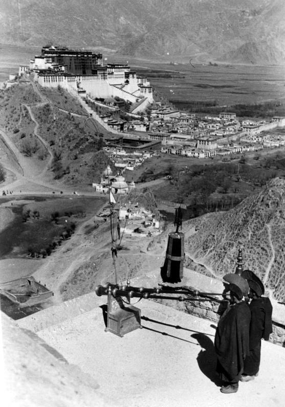 Lhasa, Medizinberg, Lamas blasen Tuben